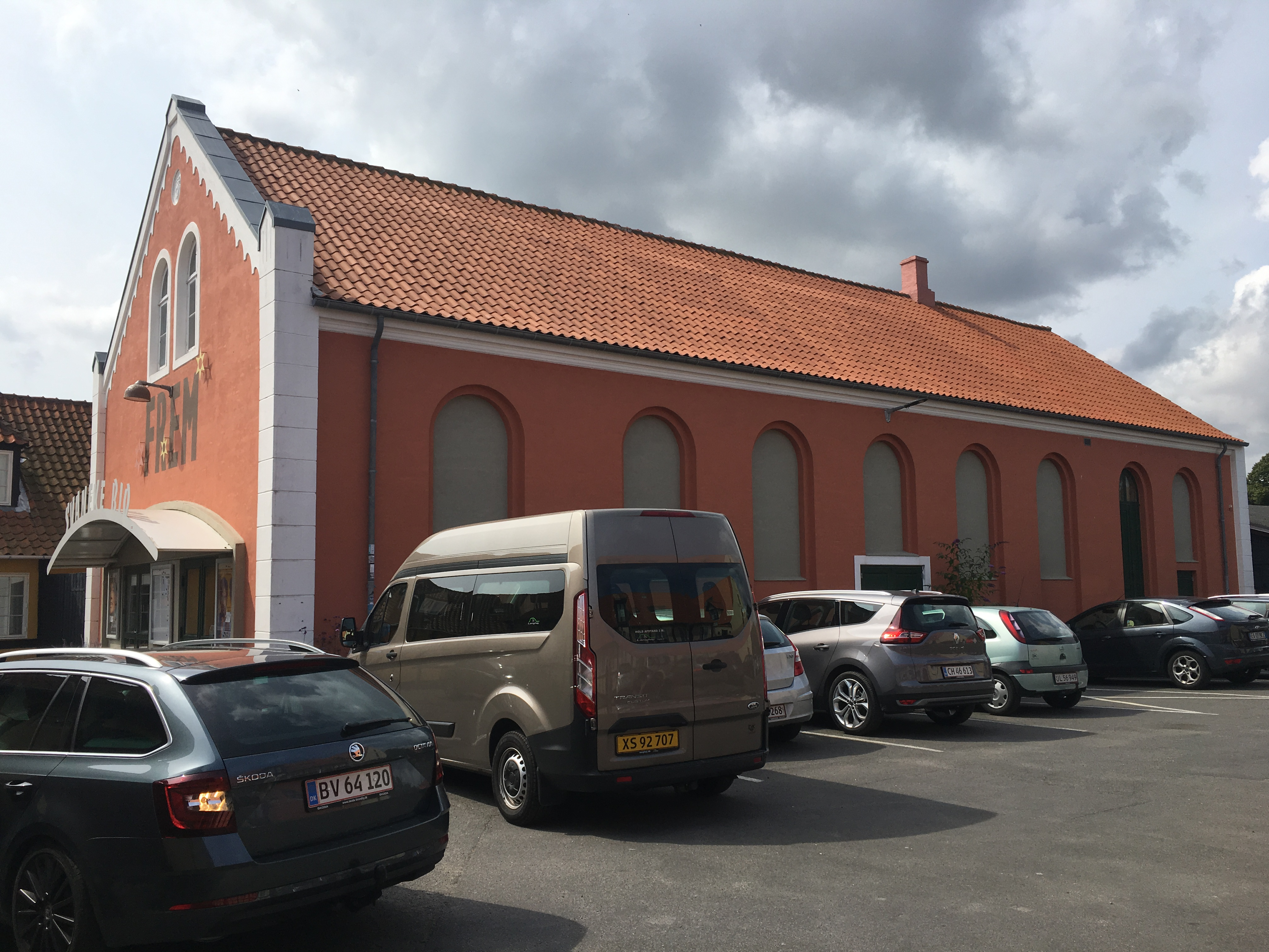 Svaneke Teater, hvor Kulturhuset FREM og Svaneke Bio er indrettet (tidligere Cassiopeia). Brænderigænget 10, 3740 Svaneke